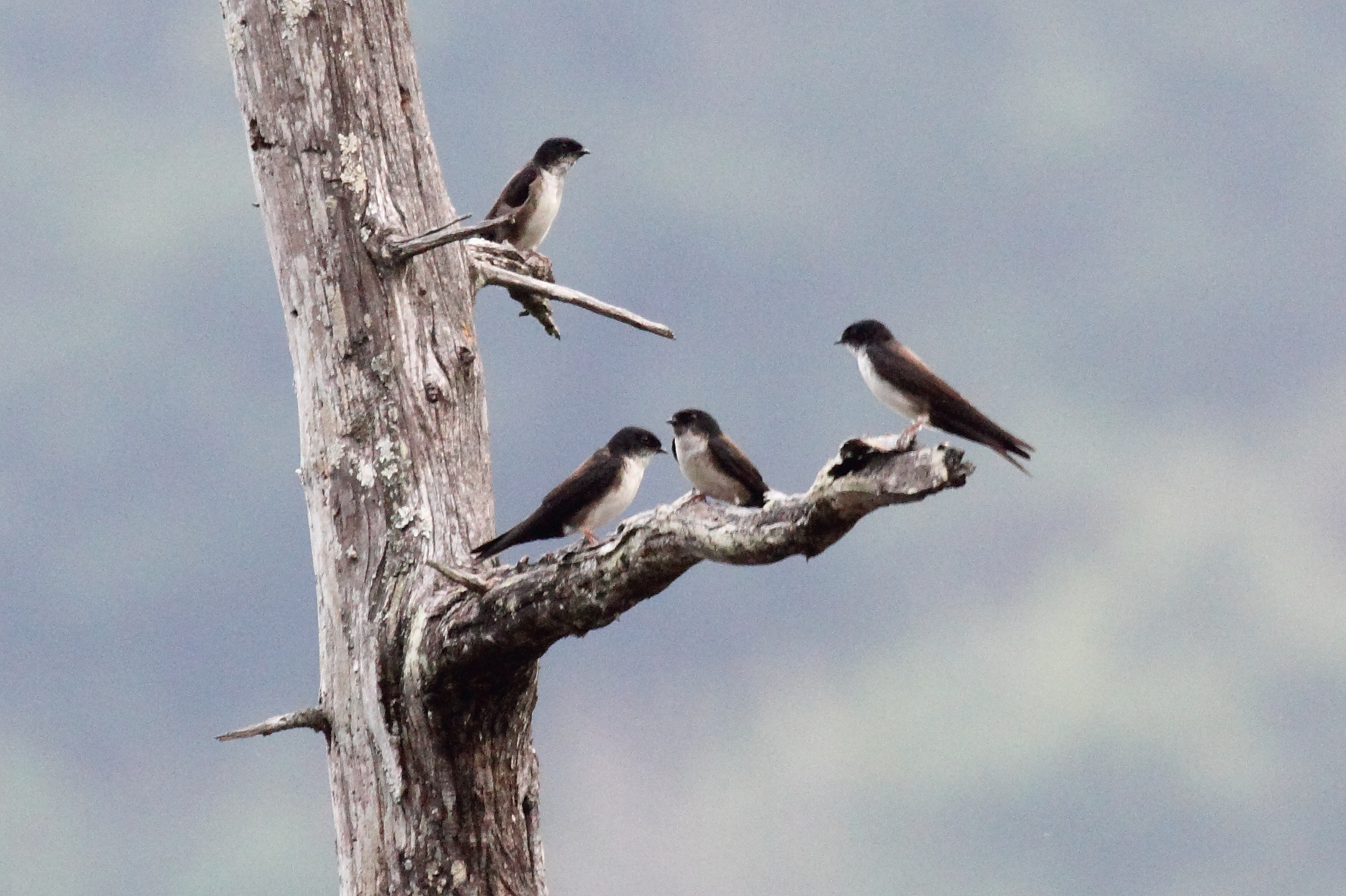 Black-capped Swallow Notiochelidon pileata, Finca El Pilar, Antigua Guatemala.